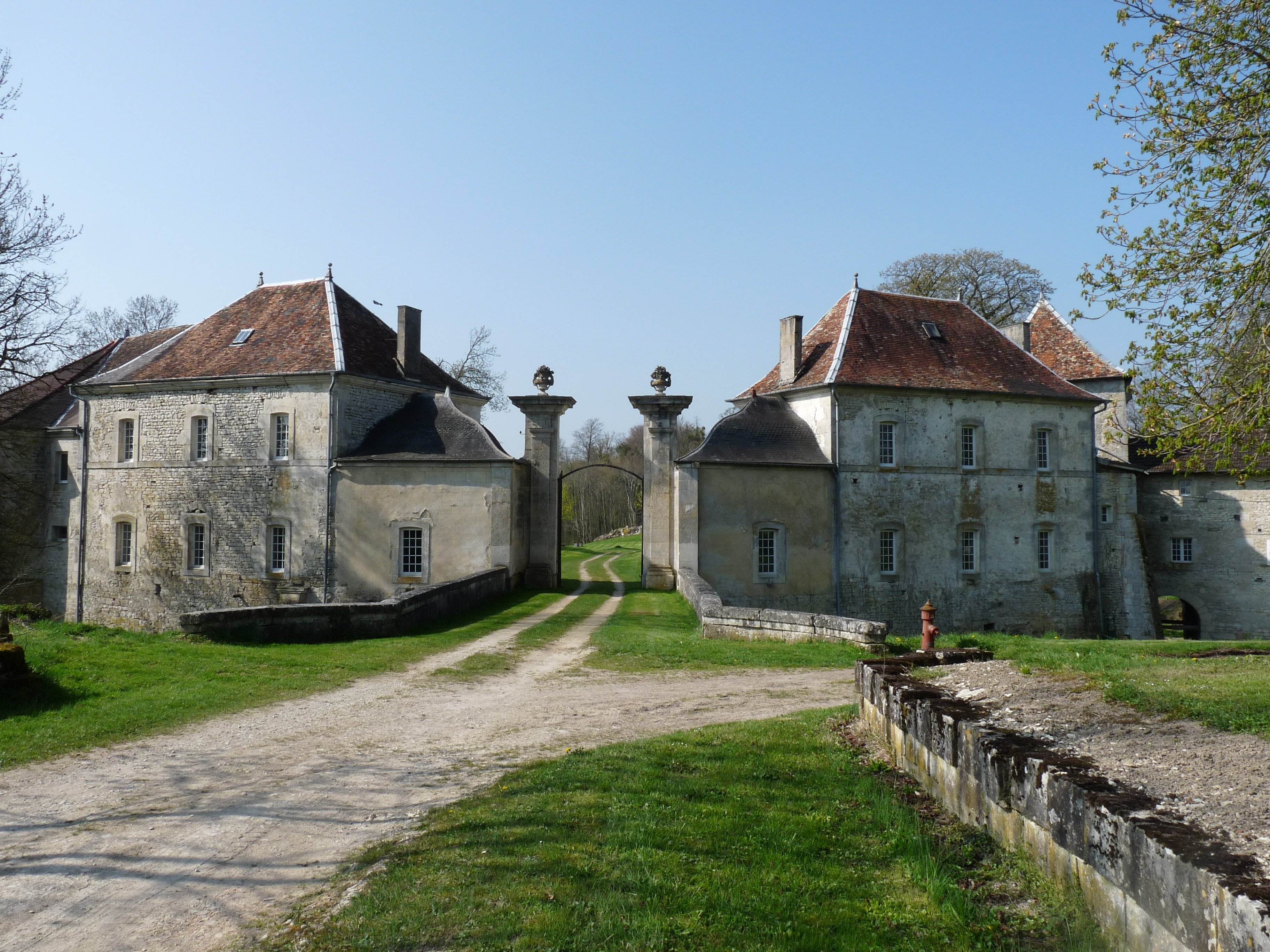 Entrée du château de Pimodan à Echenay (Haute-Marne)